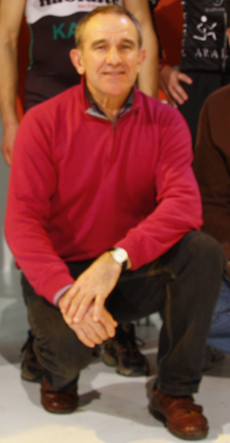 Jose Luis Korta arraunlaria